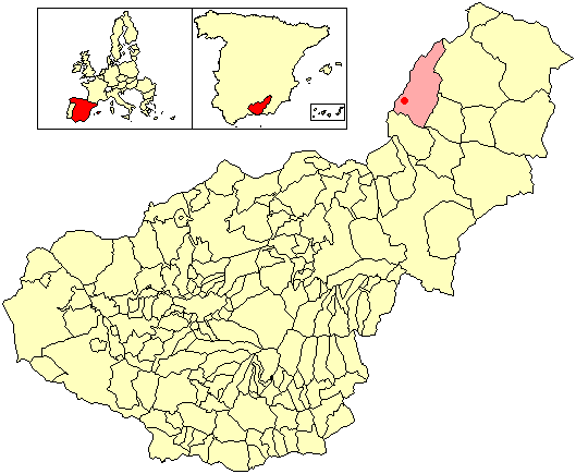 Situación del despoblado de Manuel Díaz (en el municipio de Castril) respecto a la provincia de Granada, en España.